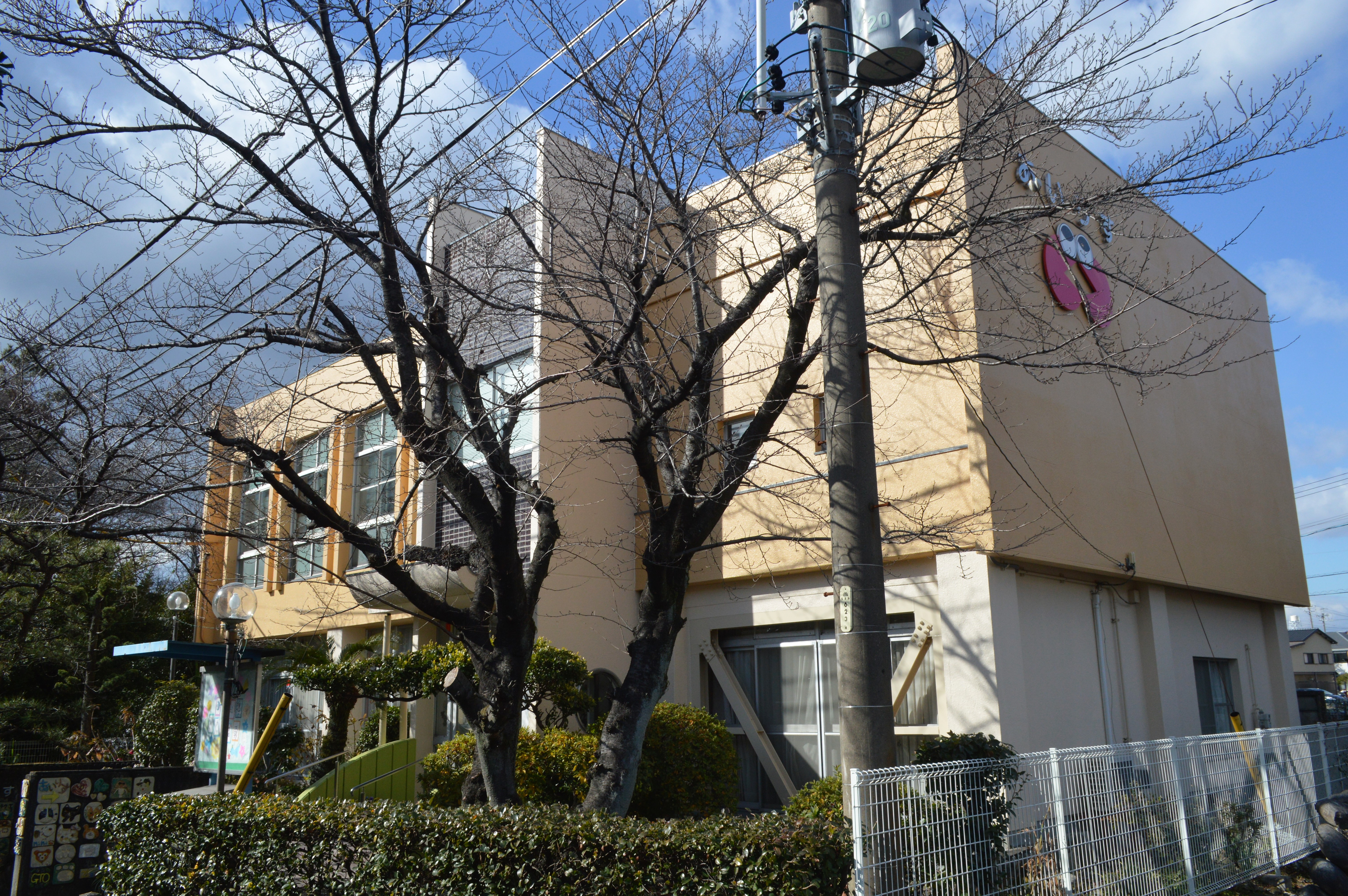 愛知県海部郡蟹江町の「学校生活適応指導教室・あいりす」。蟹江町図書館だった建物。